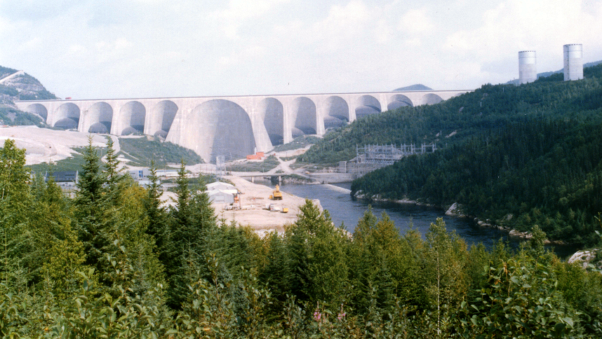 Barrage Daniel-Johnson de Manic 5 construit par Hydro-Québec dans l'est du Québec, Canada. Le plus grand barrage à voûtes multiples et à contreforts du monde - Daniel-Johnson's Manic 5 dam in Quebec, Canada. The largest arch and butteress dam in the world.